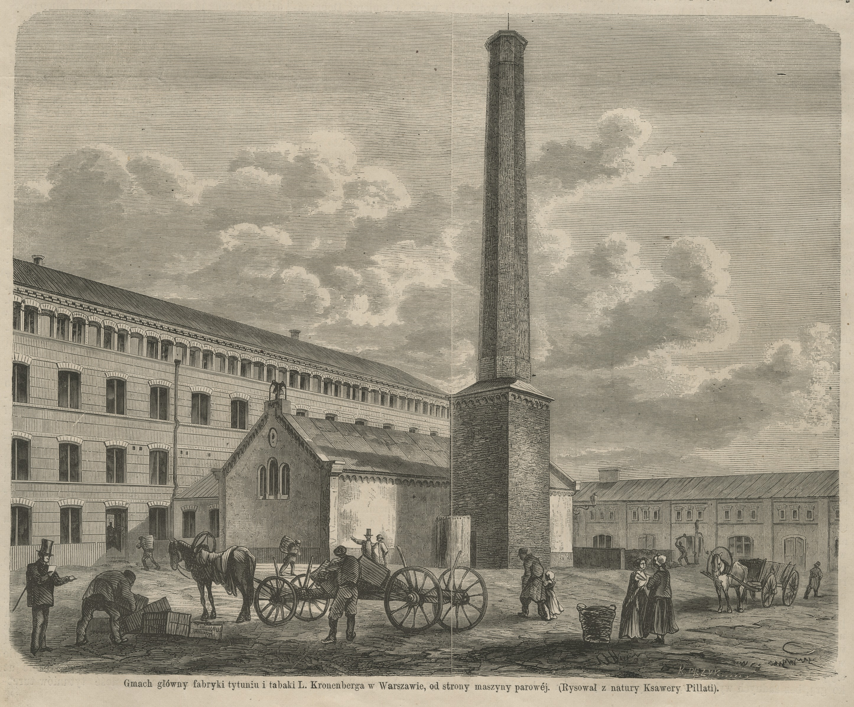 Gmach główny fabryki tytoniu i tabaki L. Kronenberga w Warszawie od strony maszyny parowej